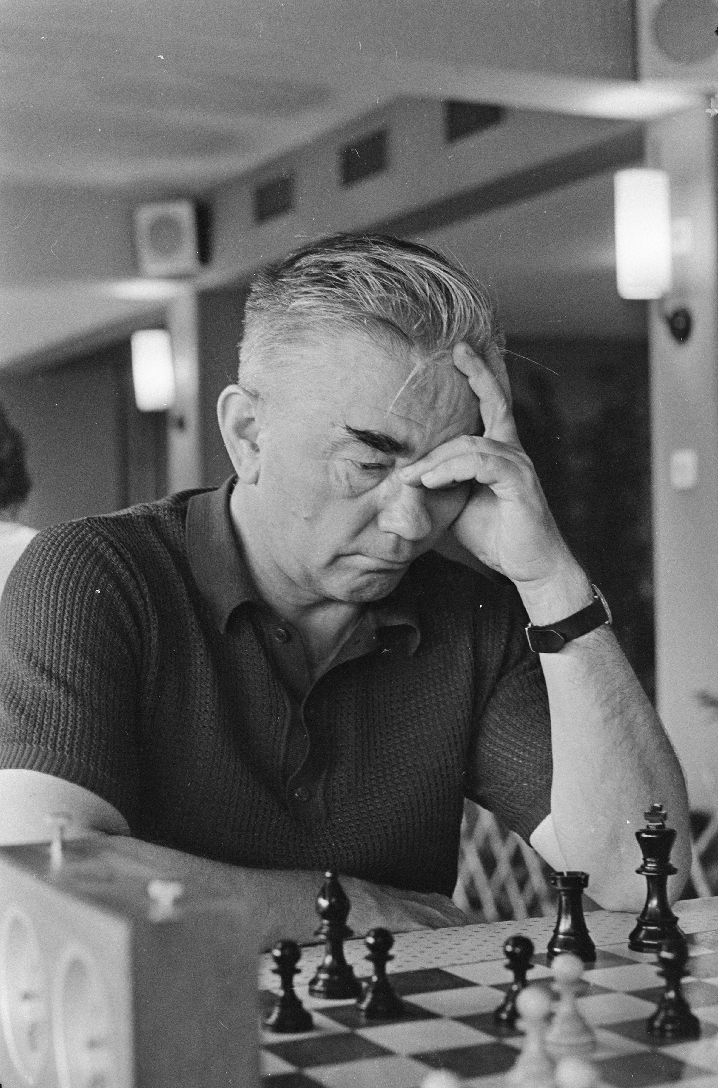 Collectie / Archief : Fotocollectie Anefo Reportage / Serie : [ onbekend ] Beschrijving : IBM Schaaktoernooi . Nummer 23 de Rus Kotov , nummer 24 de Hongaar Portisch Datum : 24 juli 1967 Trefwoorden : Schaken Fotograaf : Merk, Ben / Anefo Auteursrechthebbende : Nationaal Archief Materiaalsoort : Negatief (zwart/wit) Nummer archiefinventaris : bekijk toegang 2.24.01.05 Bestanddeelnummer : 920-5336